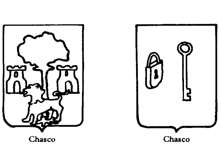 Su heráldica consta de un pino, y un león andante, atravesado al pie del tronco, arrancado; a cada lado del árbol, un castillo. Existe otro escudo según Vicente de Cadenas y Vicent: azul, una llave de plata, puesta en palo y acompañada, en la diestra, por un candado de oro.